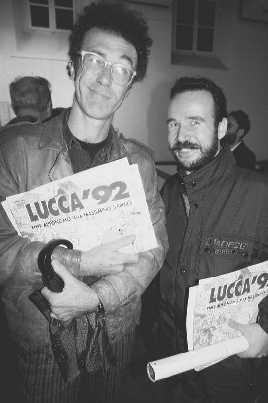 Stefano Disegni e Massimo Caviglia, fumettisti, in un ritratto fotografico di Joe Zattere (Fumetti d'Italia) scattato in Lucca Comics, 1992